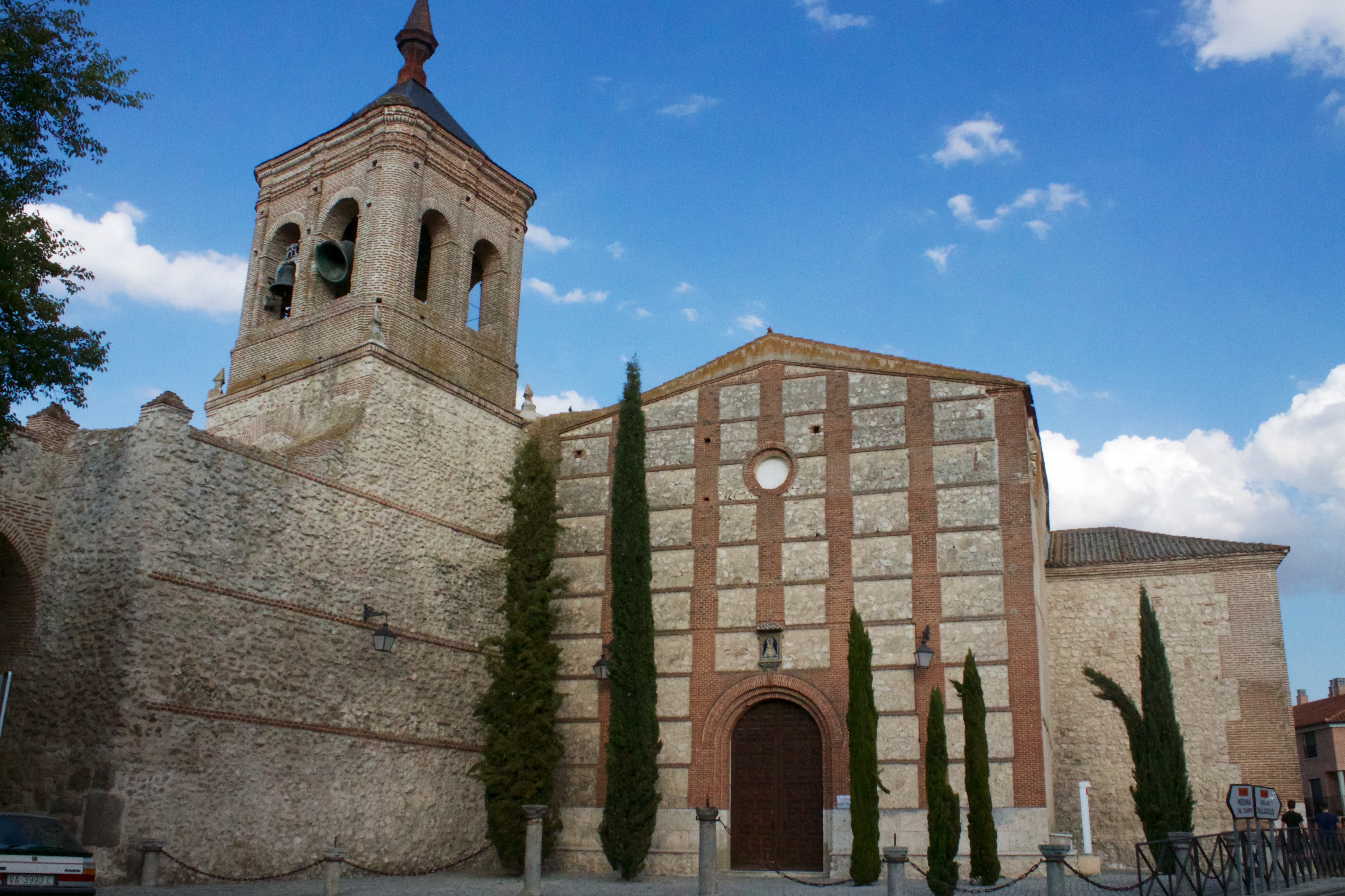 Iglesia de San Miguel en Olmedo. En el exterior, ábside románico mudejar del siglo XIII. En 1782 se erigió la torre sobre los muros de la muralla. En su interior, además de poder disfrutar de distintos estilos artísticos, es destacable el retablo sin policromía de la cabecera.